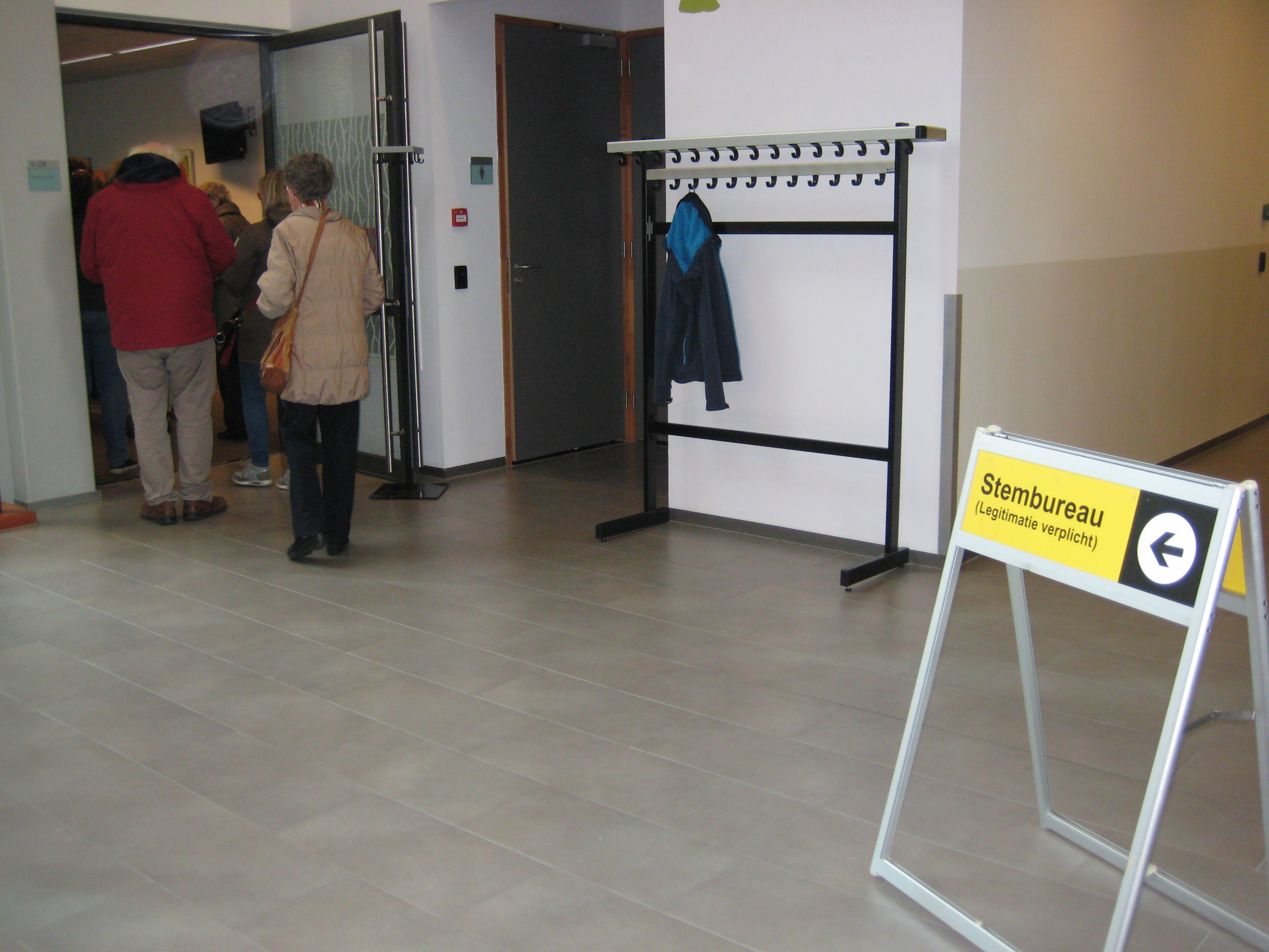 Stembureau gemeentehuis Winterswijk